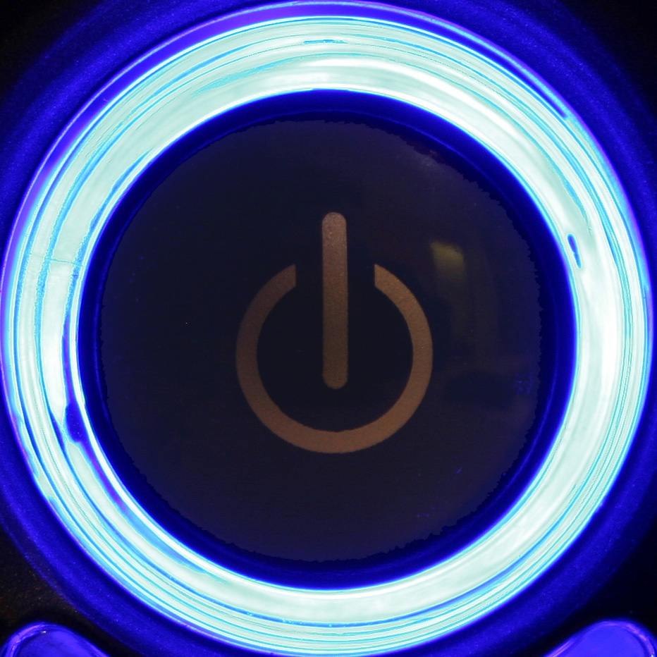 Un botón para acender un aparato electrónico.